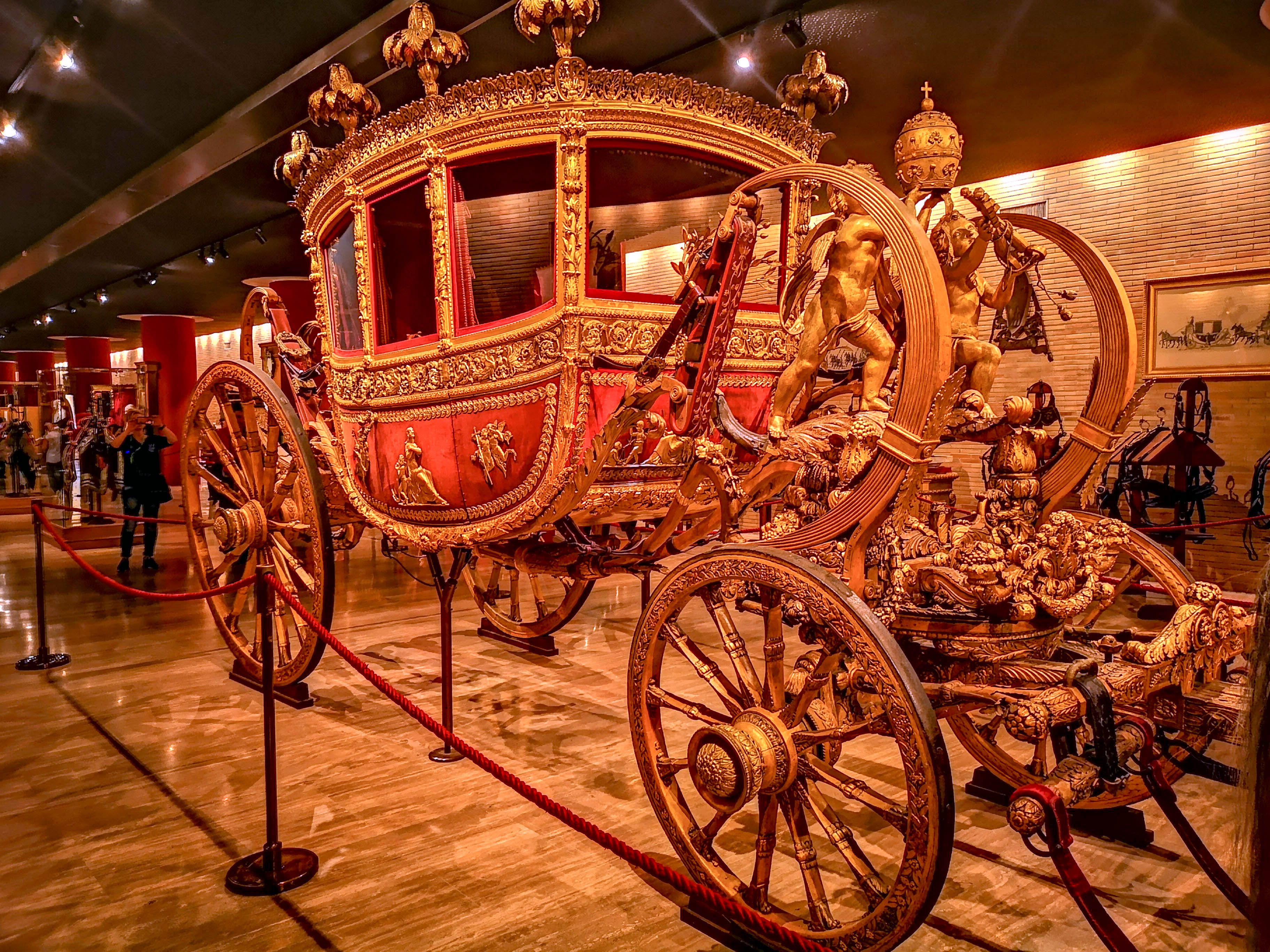 “Гран Гала Берлин” (1826-1841) е луксозна папска каляска, използвана от двама папи - Лео XII и Грегории XVI. Снимка от Ватиканските музеи, Рим